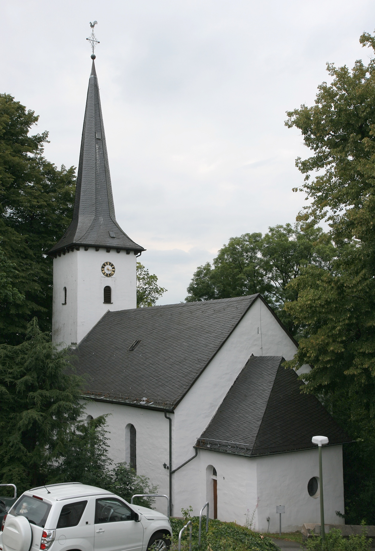 Evangelische Pfarrkirche in Schalksmühle-Hülscheid. Saalkirche: quadratischer Turm, eingezogener Spitzhelm, verputztes Bruchsteinmauerwerk, Schieferbedachung, Dreiachsenrundbogenfenster.